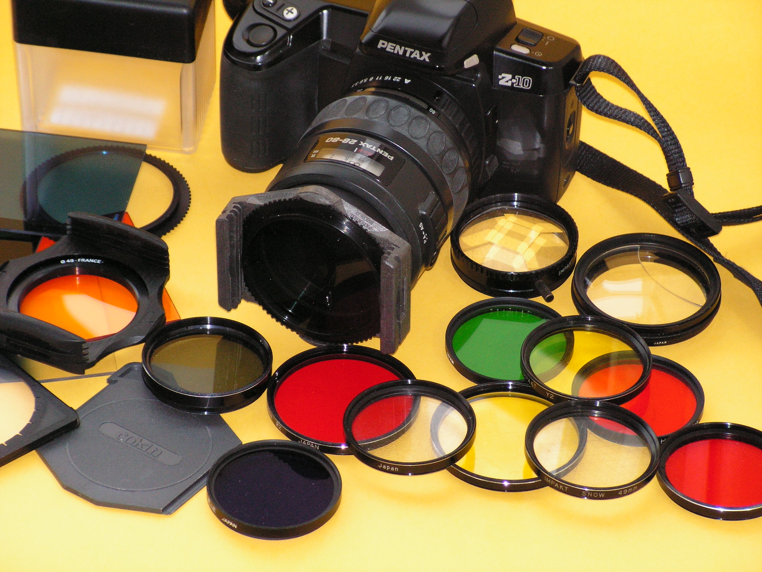 foto stefan linder